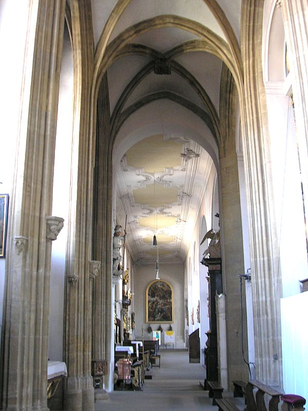 Obere Pfarrkirche Bamberg (Oberfranken). Das südliche Seitenschiff aus dem Chorumgang. Blick nach Westen. Eigene Aufnahme, April 2007 / Upper Parish Church (Bamberg, Upper Franconia, Germany). The choir. Looking west into the southern aisle of the nave. Own photo, April 2007